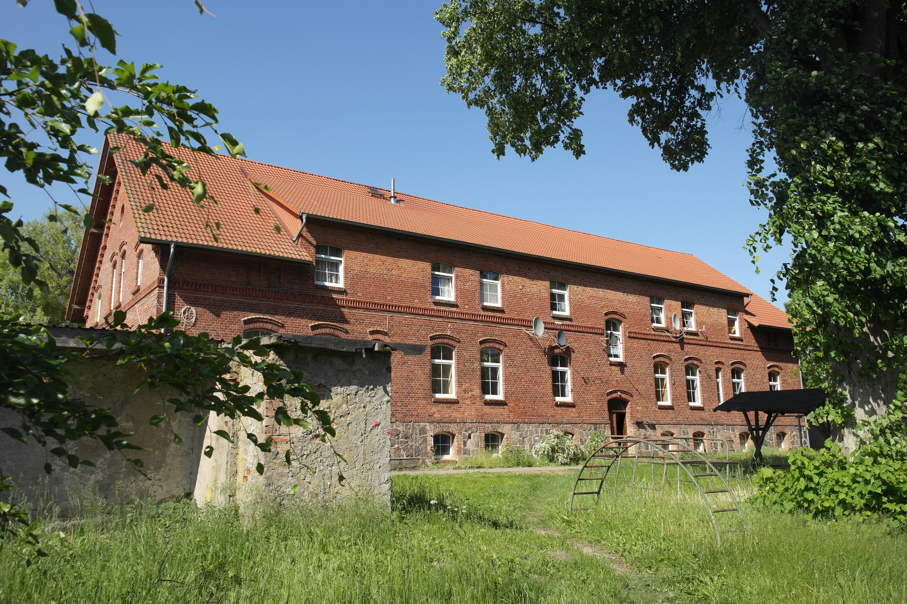 Helpt, denkmalgeschütztes Gutshaus, Parkseite